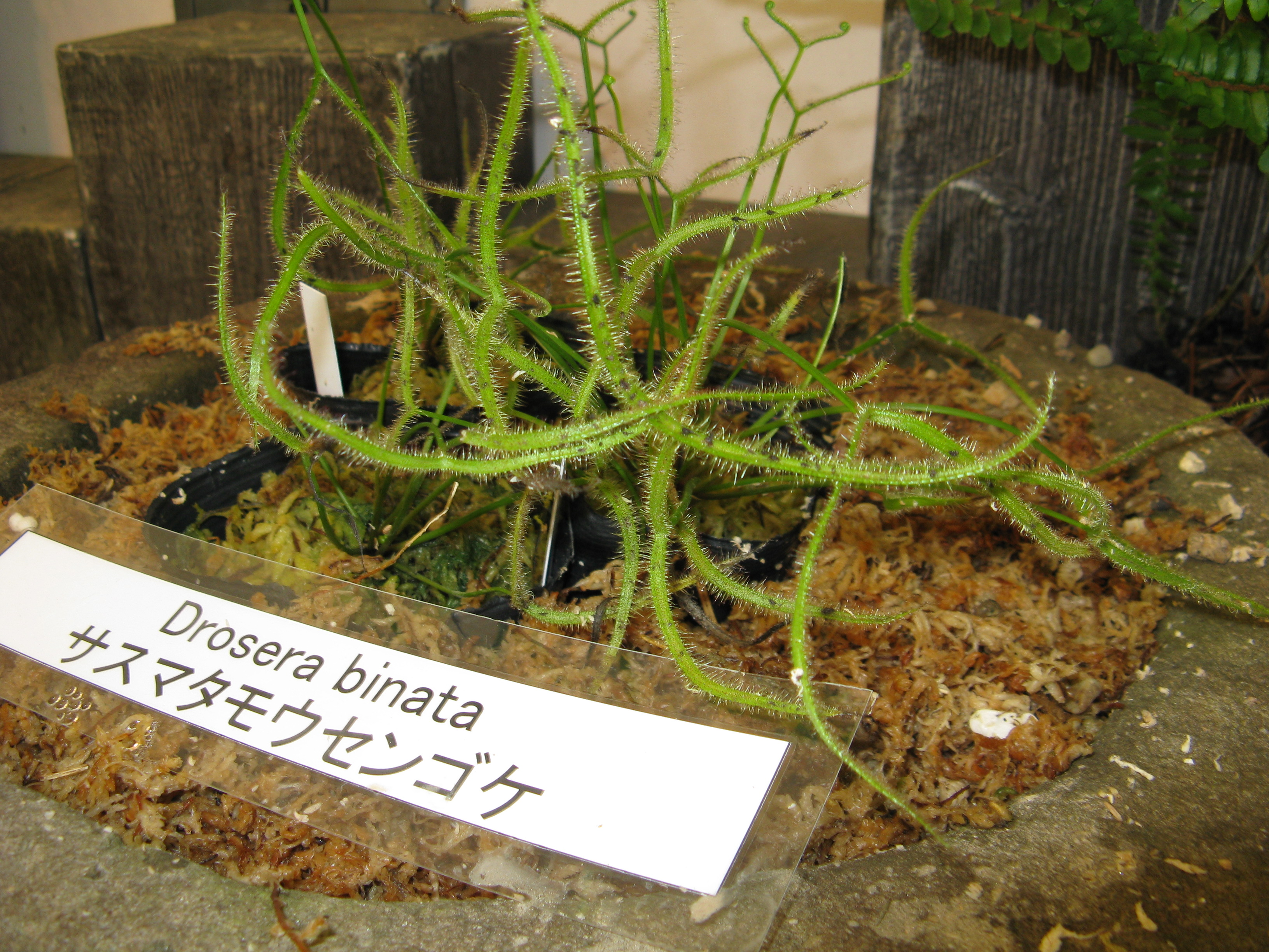 Scientific name Drosera binata